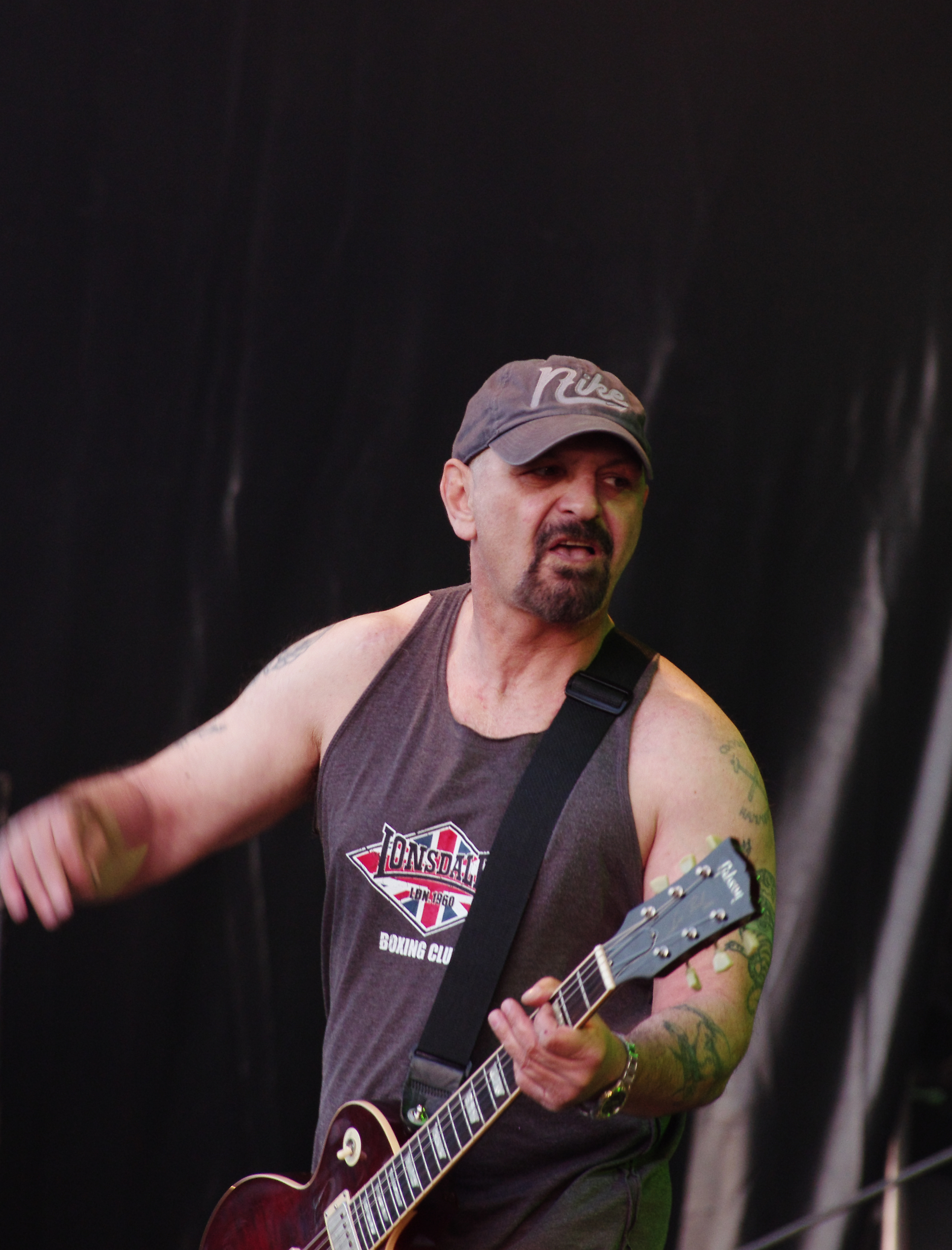 Cockney Rejects beim Ruhrpott Rodeo 2013 in Hünxe. Mick Geggus (Gitarres)